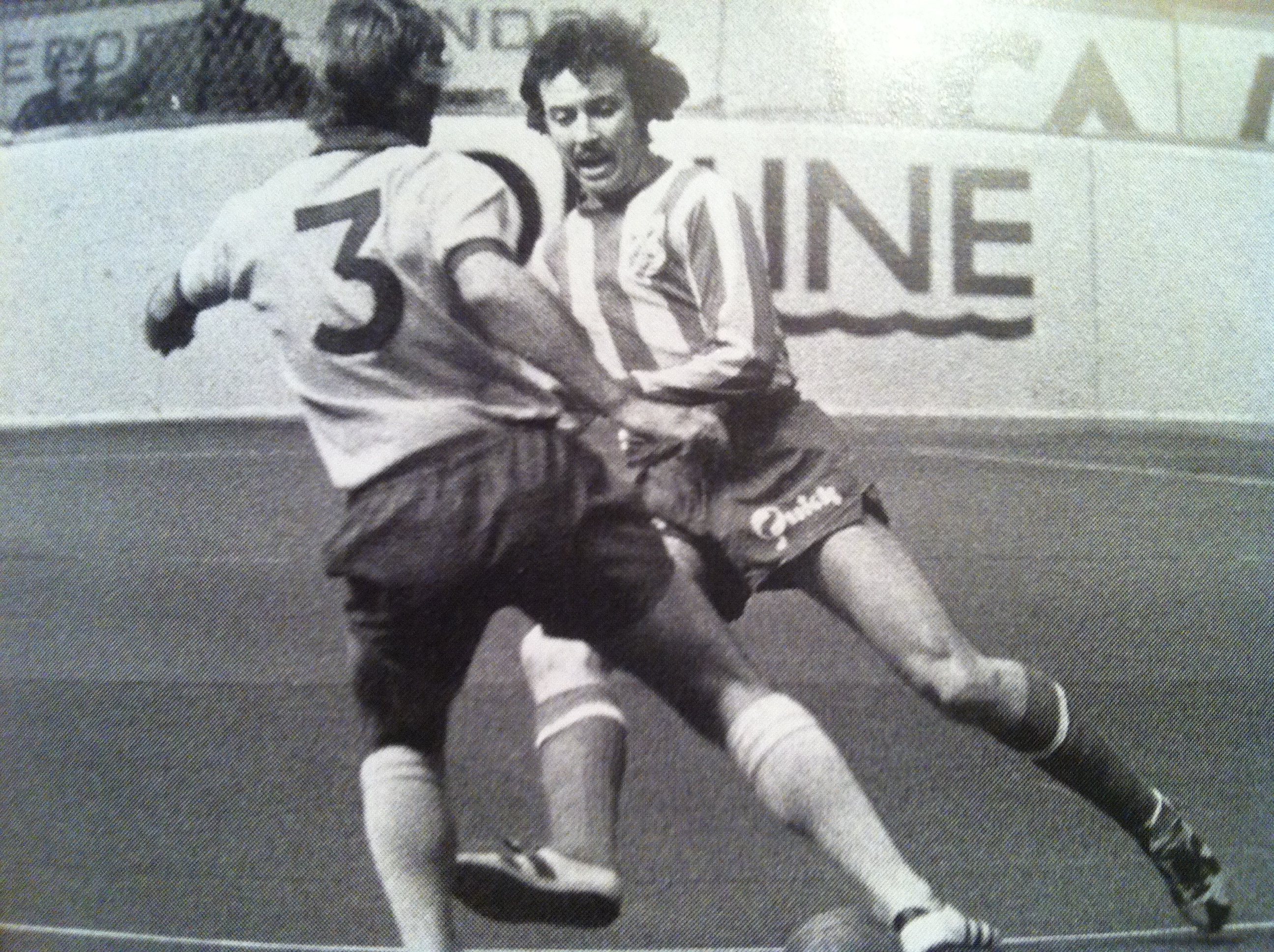 Sten Danielsson IFK Göteborg